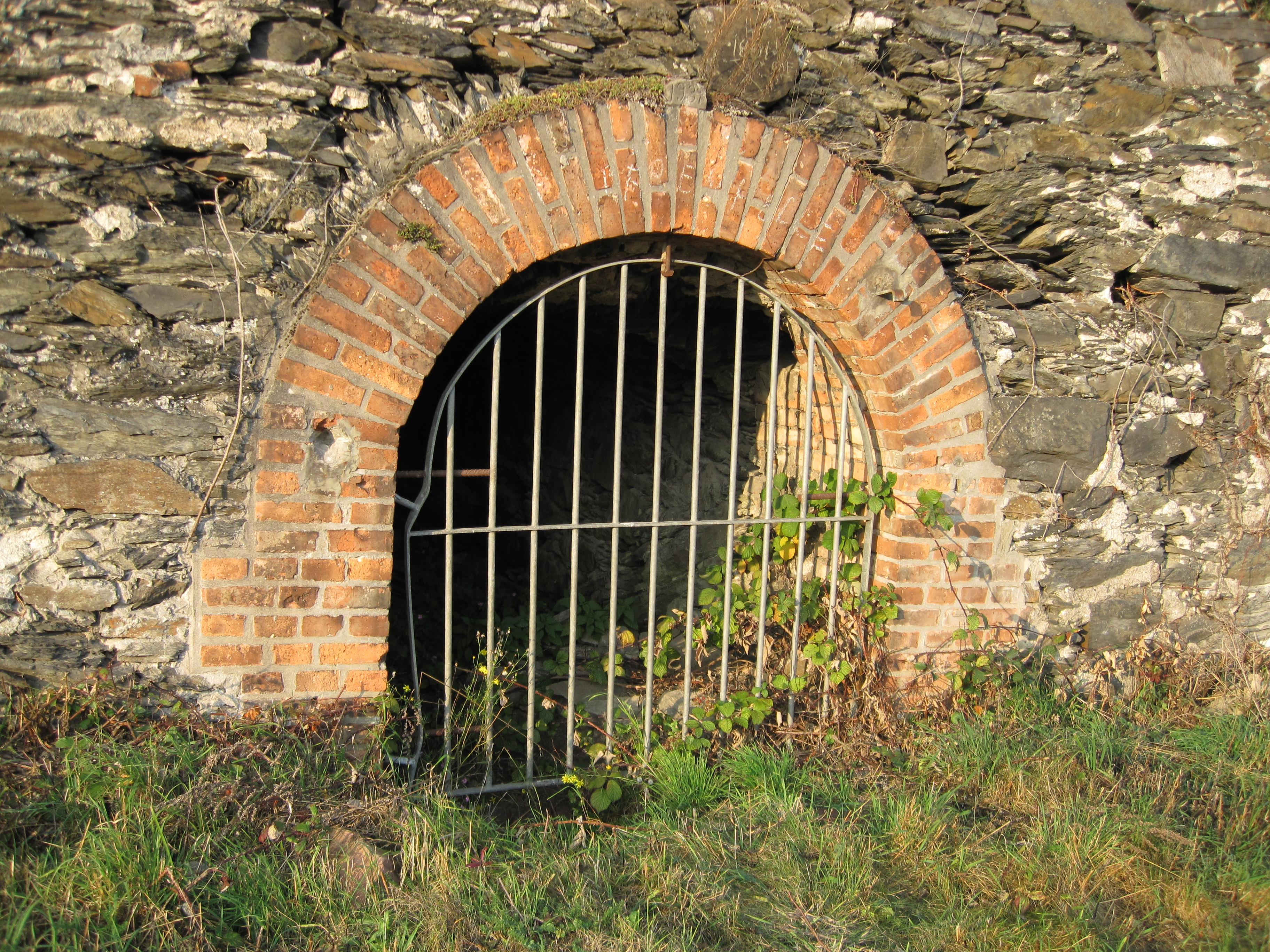 Grube Gute Hoffnung: Stollenmundloch des Grundstollens bei St. Goarshausen-Wellmich